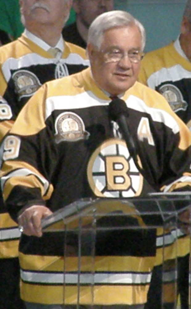 John "Chief" Bucyk Pittsburgh Penguins at (vs) Boston Bruins, TD Banknorth Garden (Boston Garden), March 18, 2010